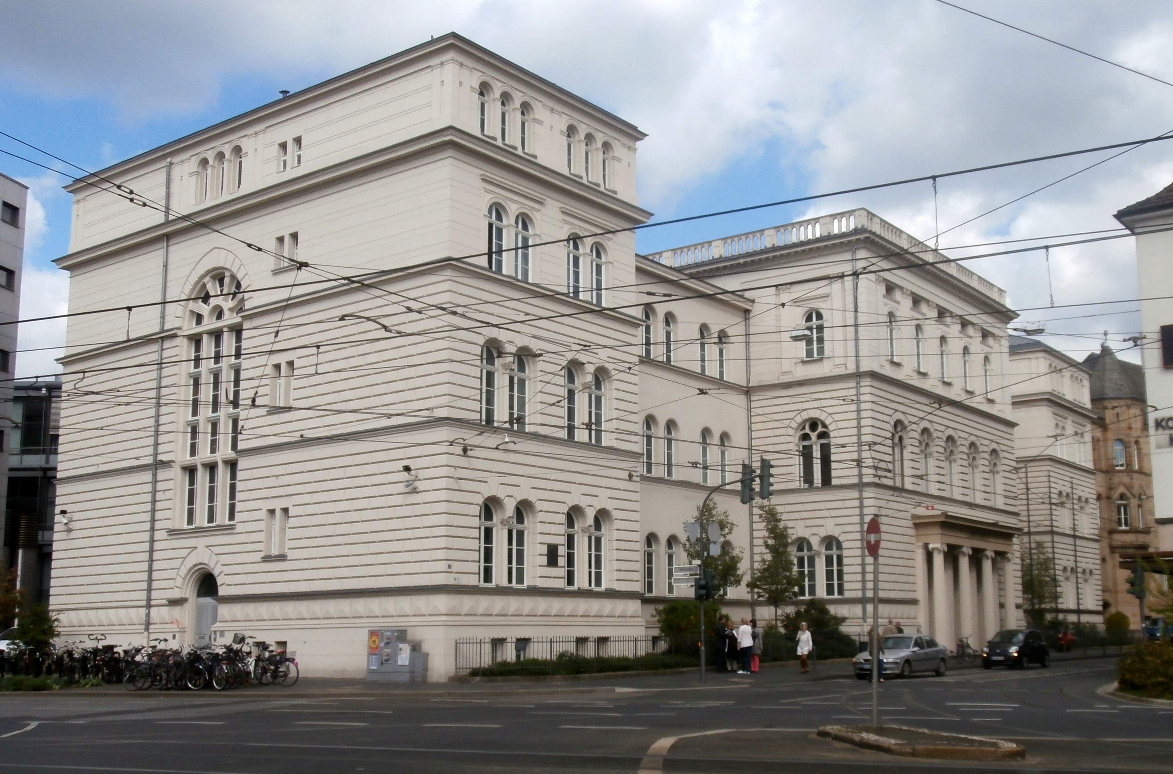 Landgericht, Bonn: Ansicht von der Oxfordstraße